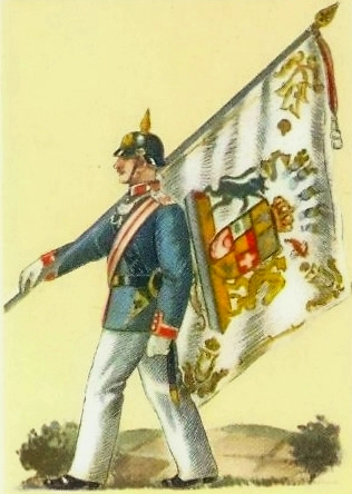 Fahne des III. Bataillons um 1900